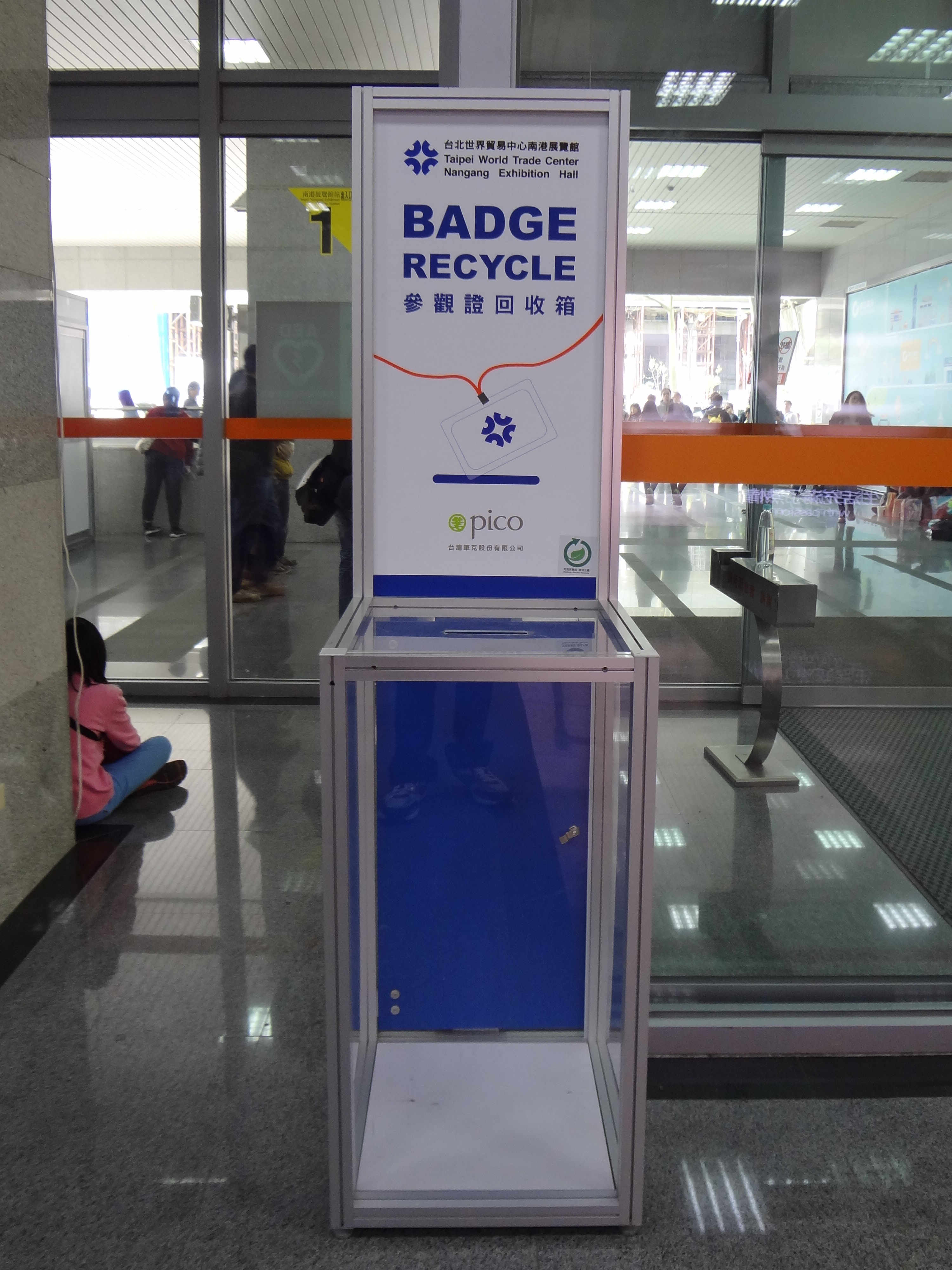 台灣筆克於台北世界貿易中心南港展覽館1樓南門內側設置的參觀證回收箱。